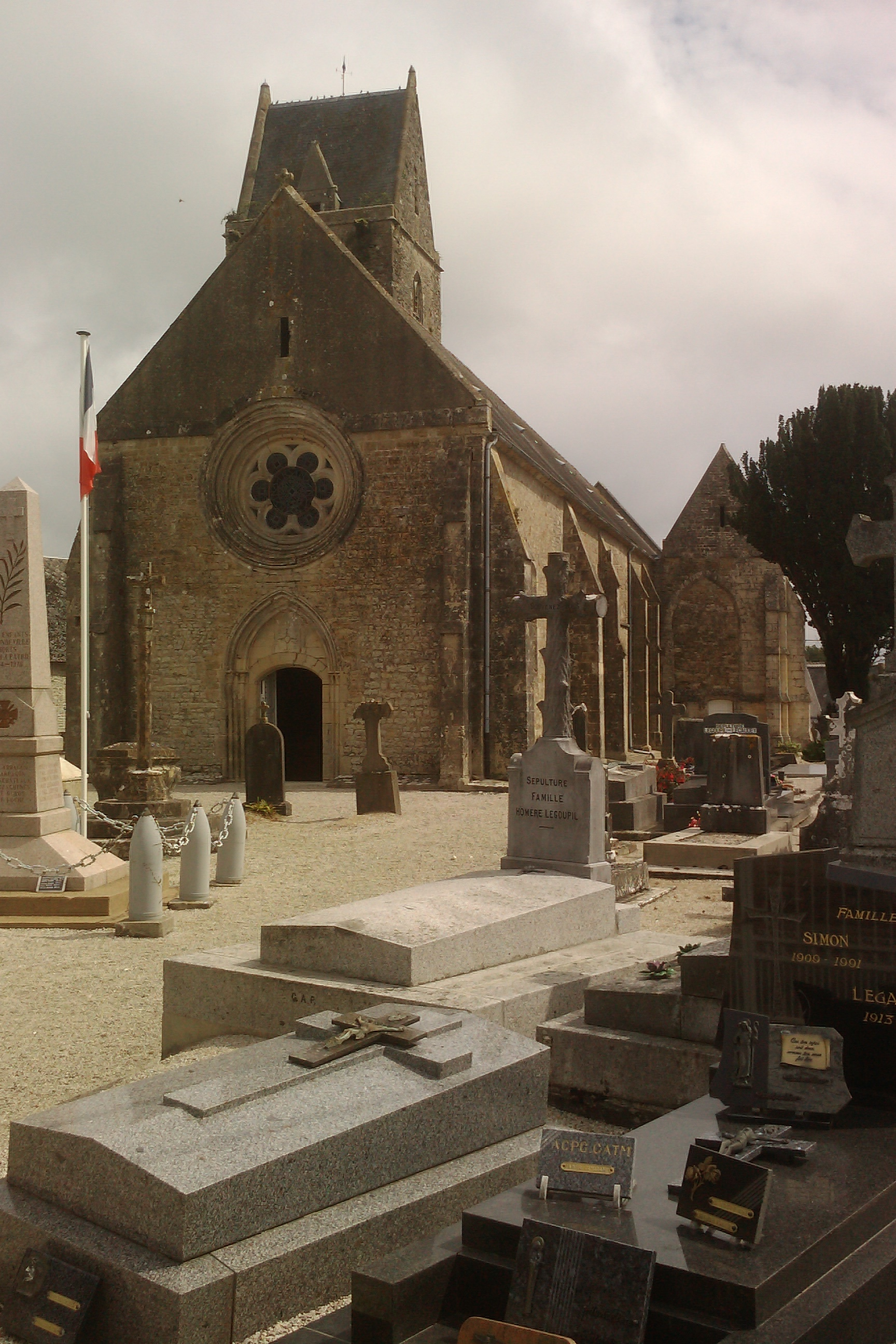 Église paroissiale Notre-Dame d'Émondeville